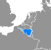 Idioma valón